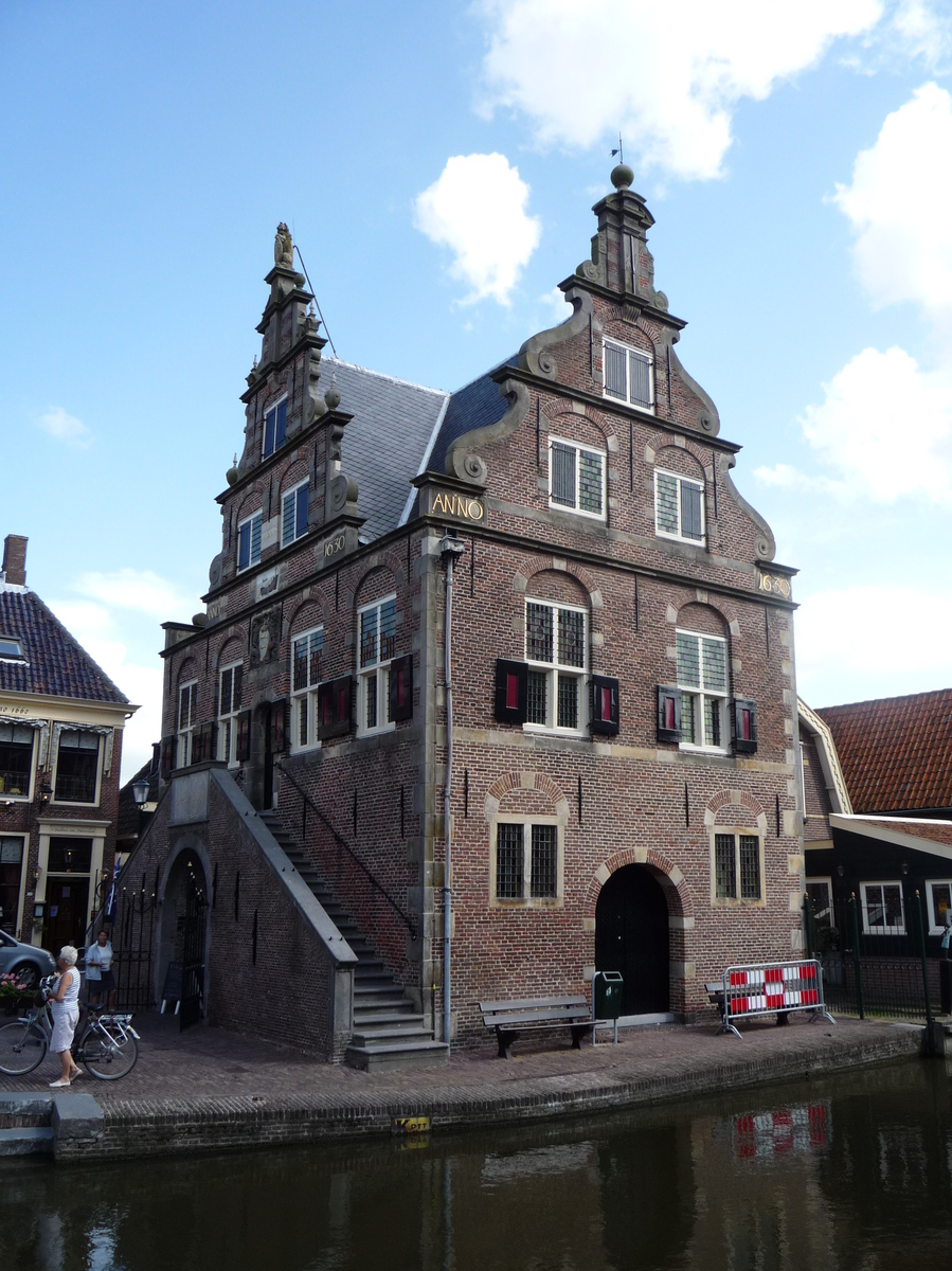 Raadhuis De Rijp